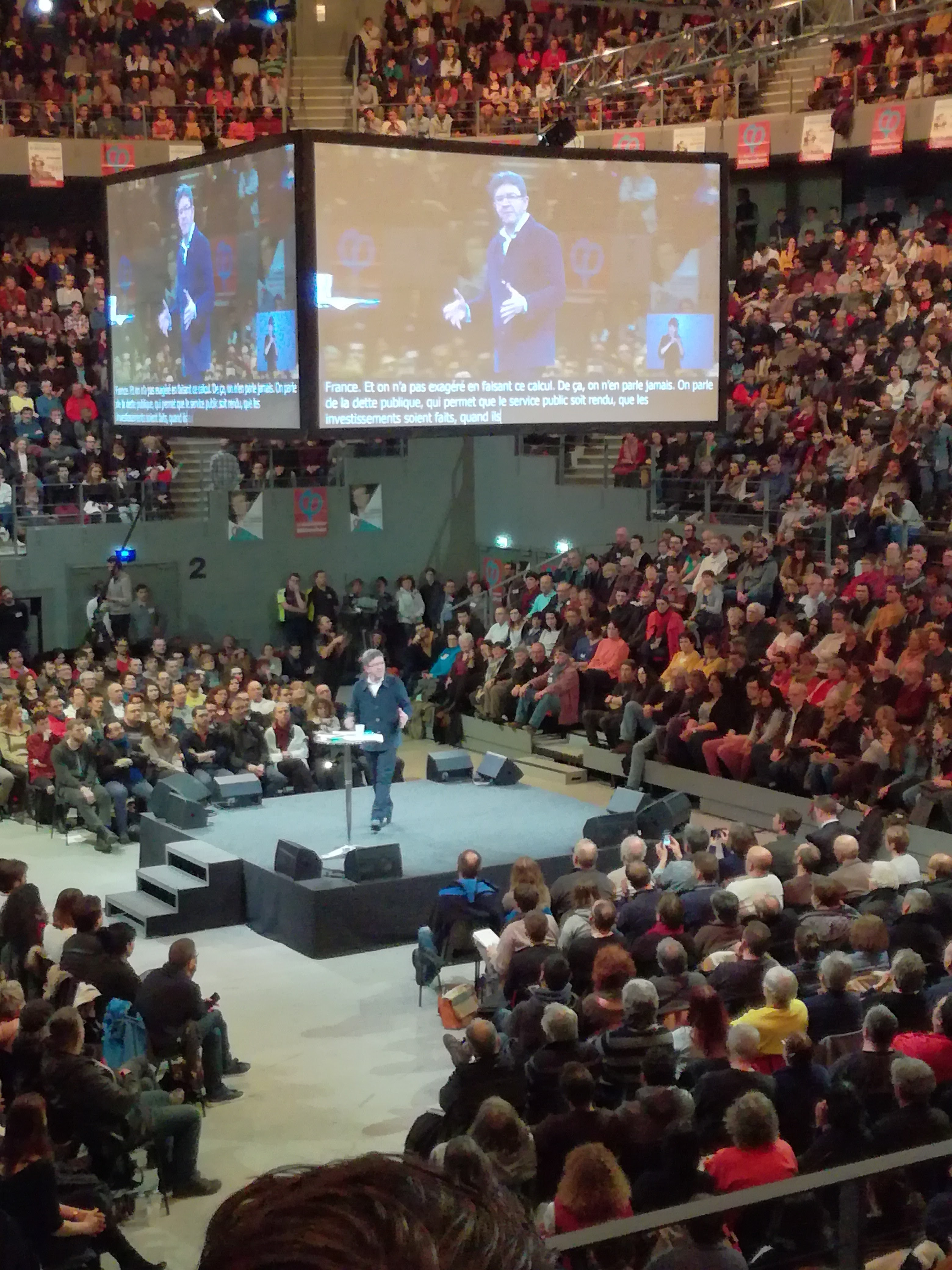 Réunion publique de Jean-Luc Mélenchon à Brest (Brest Arena) devant 4000 personnes le 28 février 2017 dans le cadre de l'élection présidentielle.